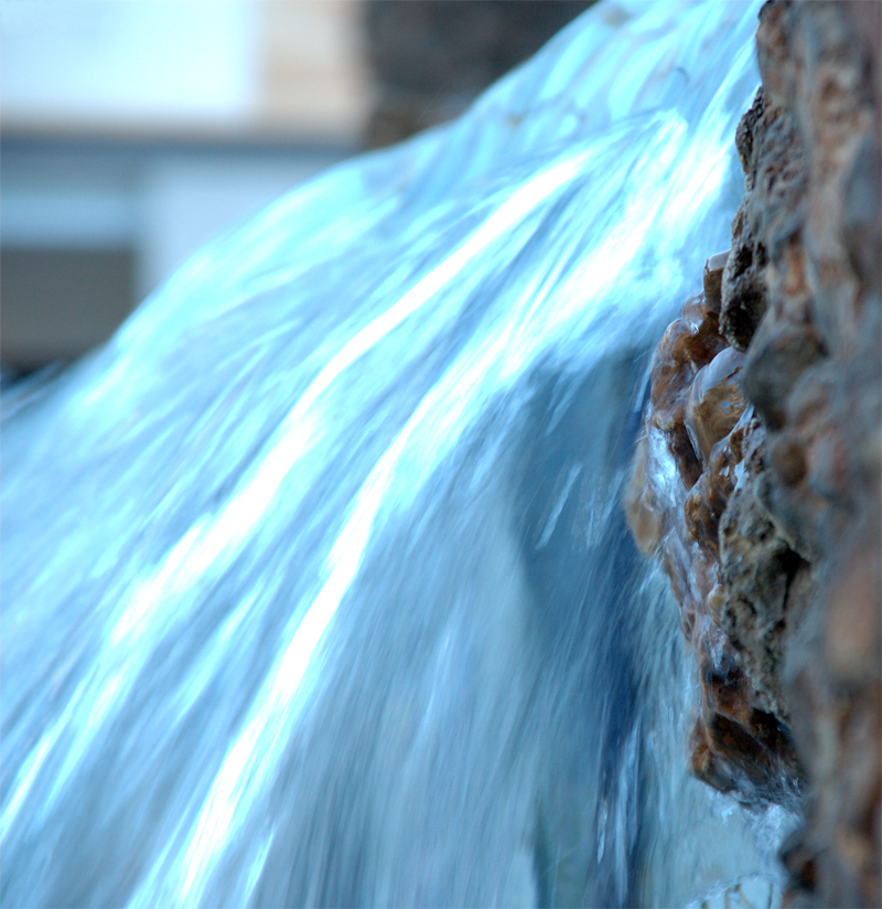 Fuente Taken by J.Garcia